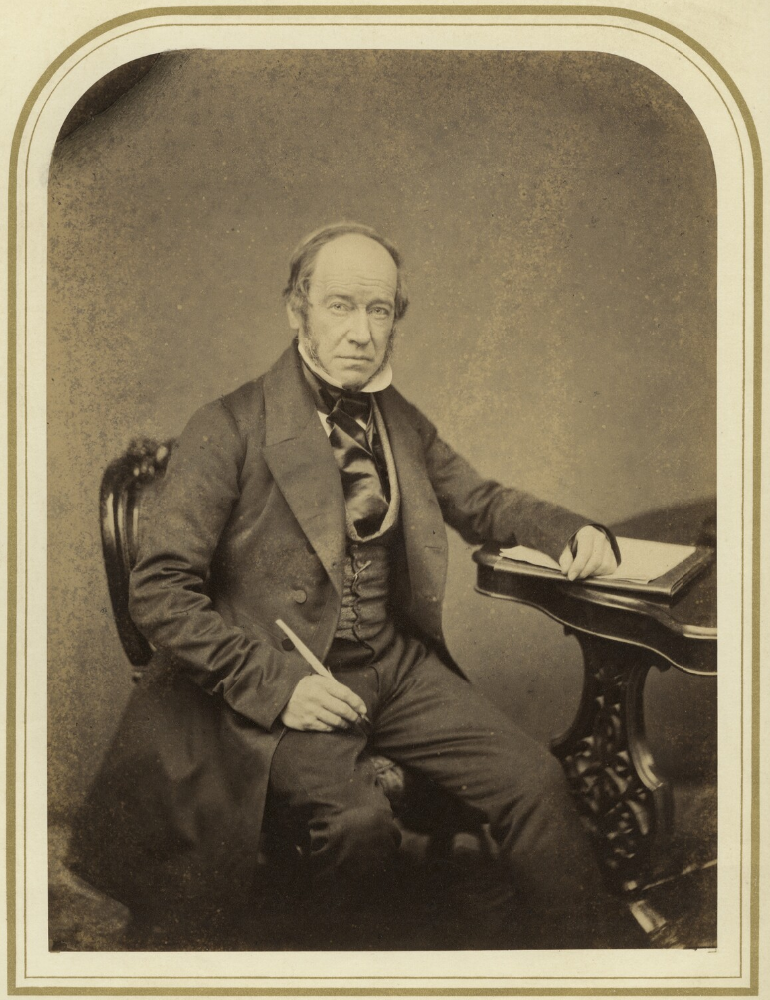 Der Admiral der Royal Navy und Politiker der Conservative Party Charles Abbot, zweiter Baron Colchester